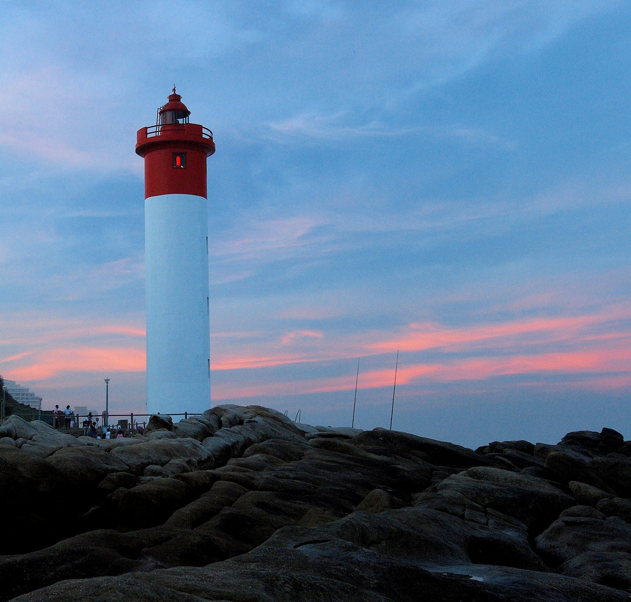 Umhlanga Rocks-vuurtoring